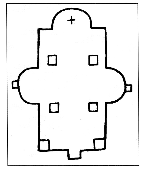 Храм “з баковымі апсідамі” Бельчыцкага манастыра паводле малюнка канца XVIII ст